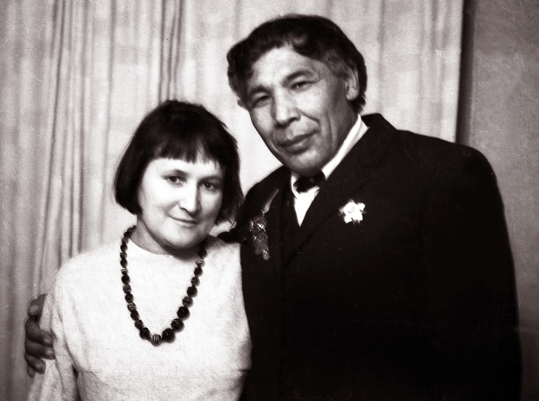 Молдабеков А. с женой Гадеевой Т.С. в 1971 году